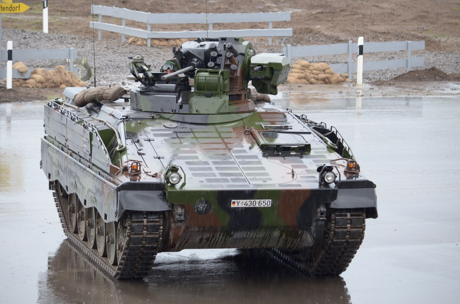 Eindrücke von der ILÜ 2012 der BW 24.09.2012)